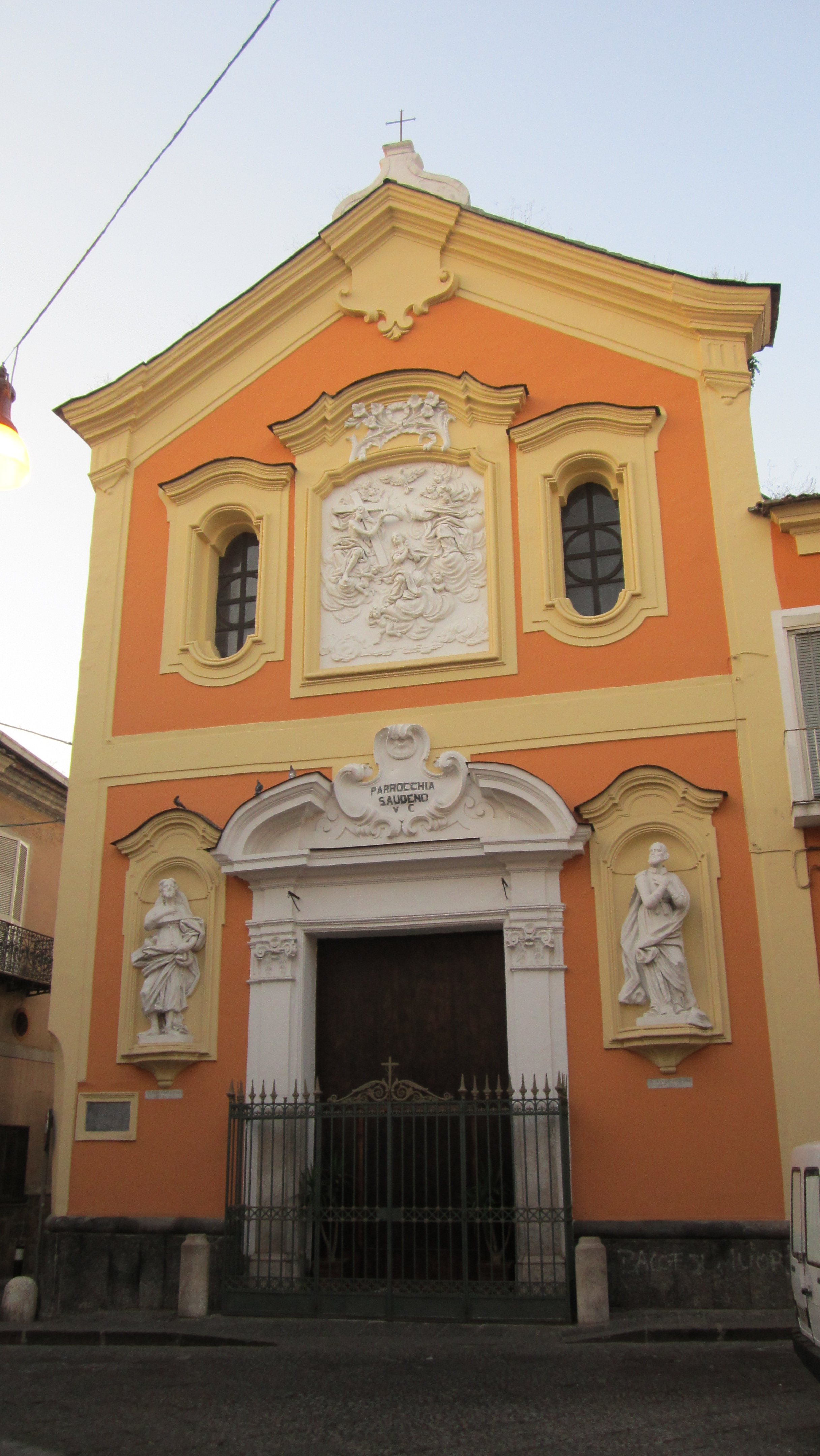 Opera propria